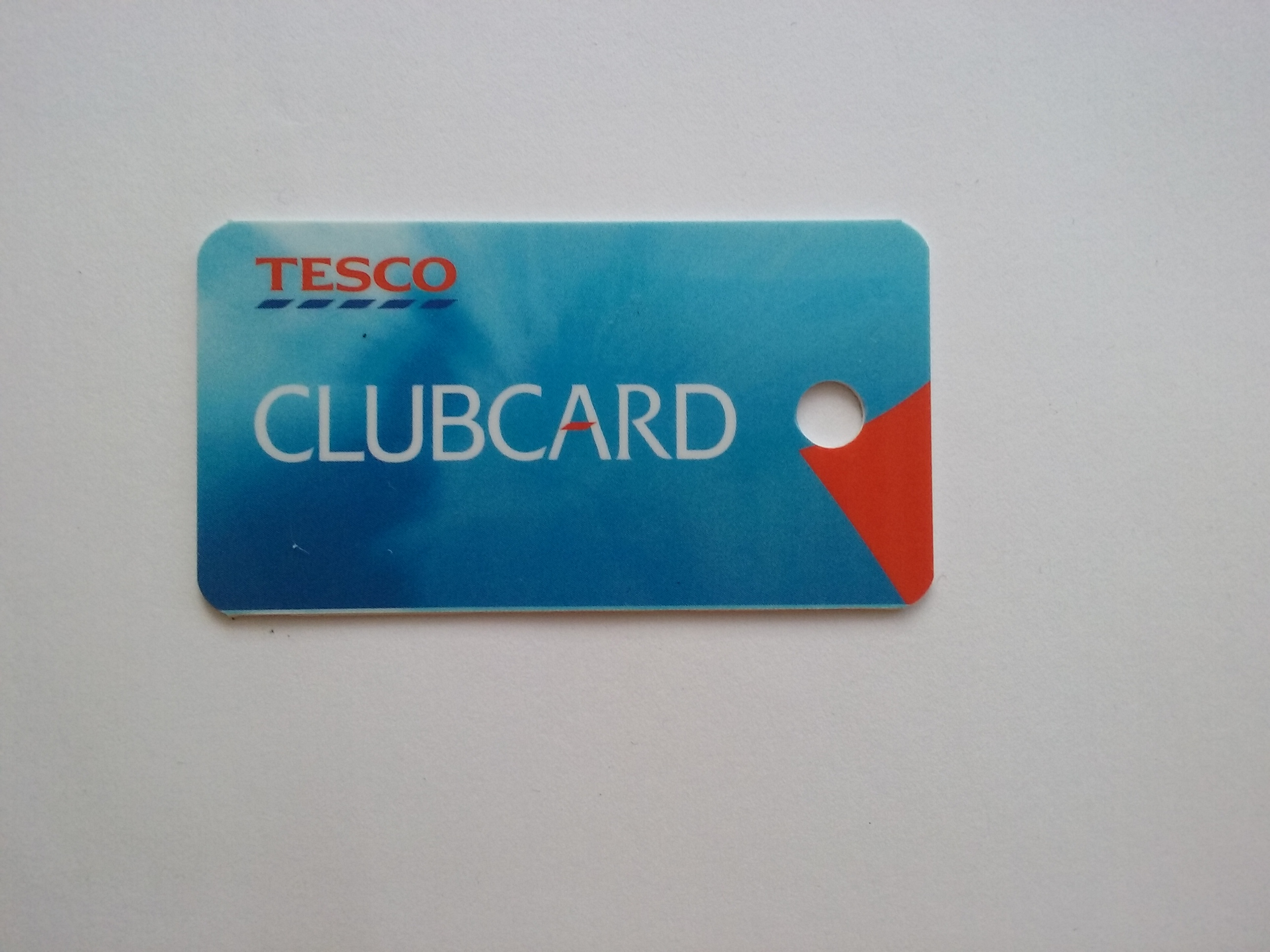 Karta Tesco ClubCard